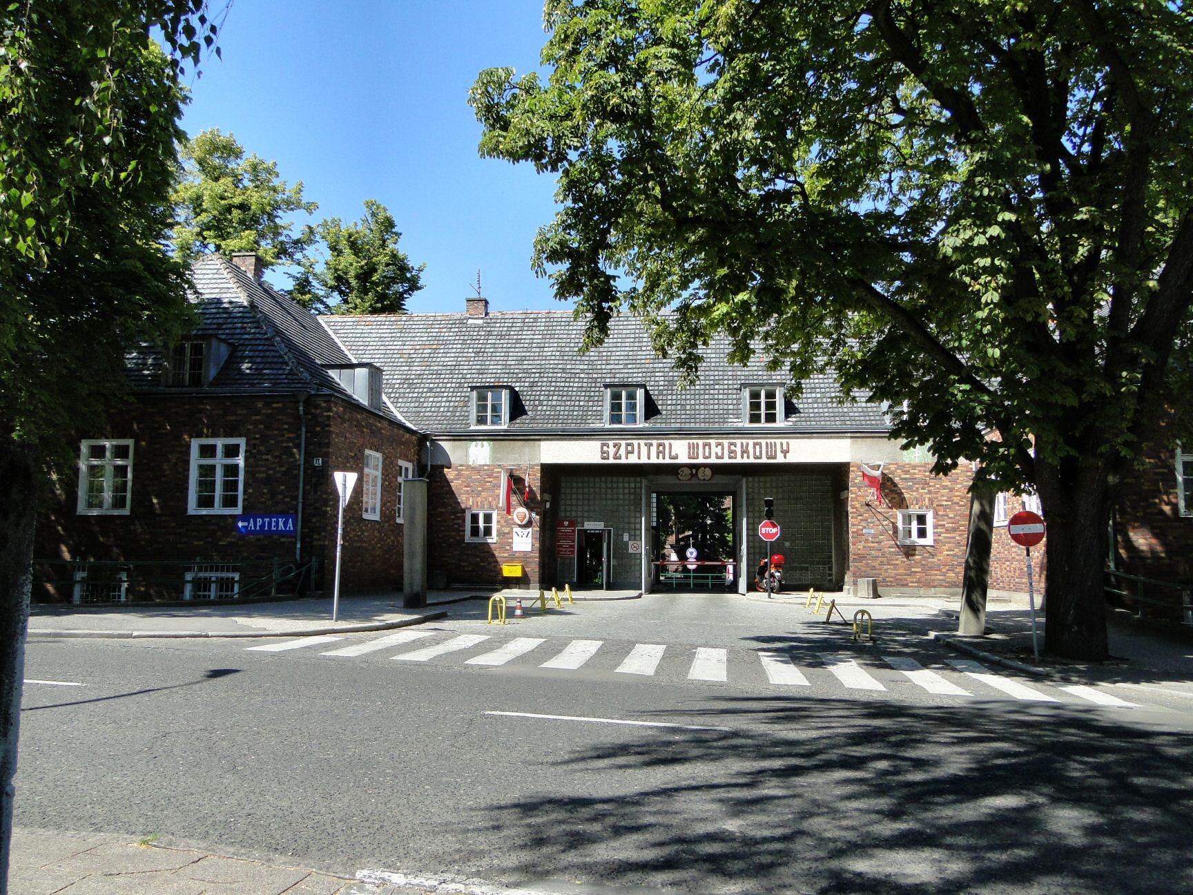 Szpital Wojskowy przy ul. Piotra Skargi w Szczecinie (zabytek nr rejestr. 1232)